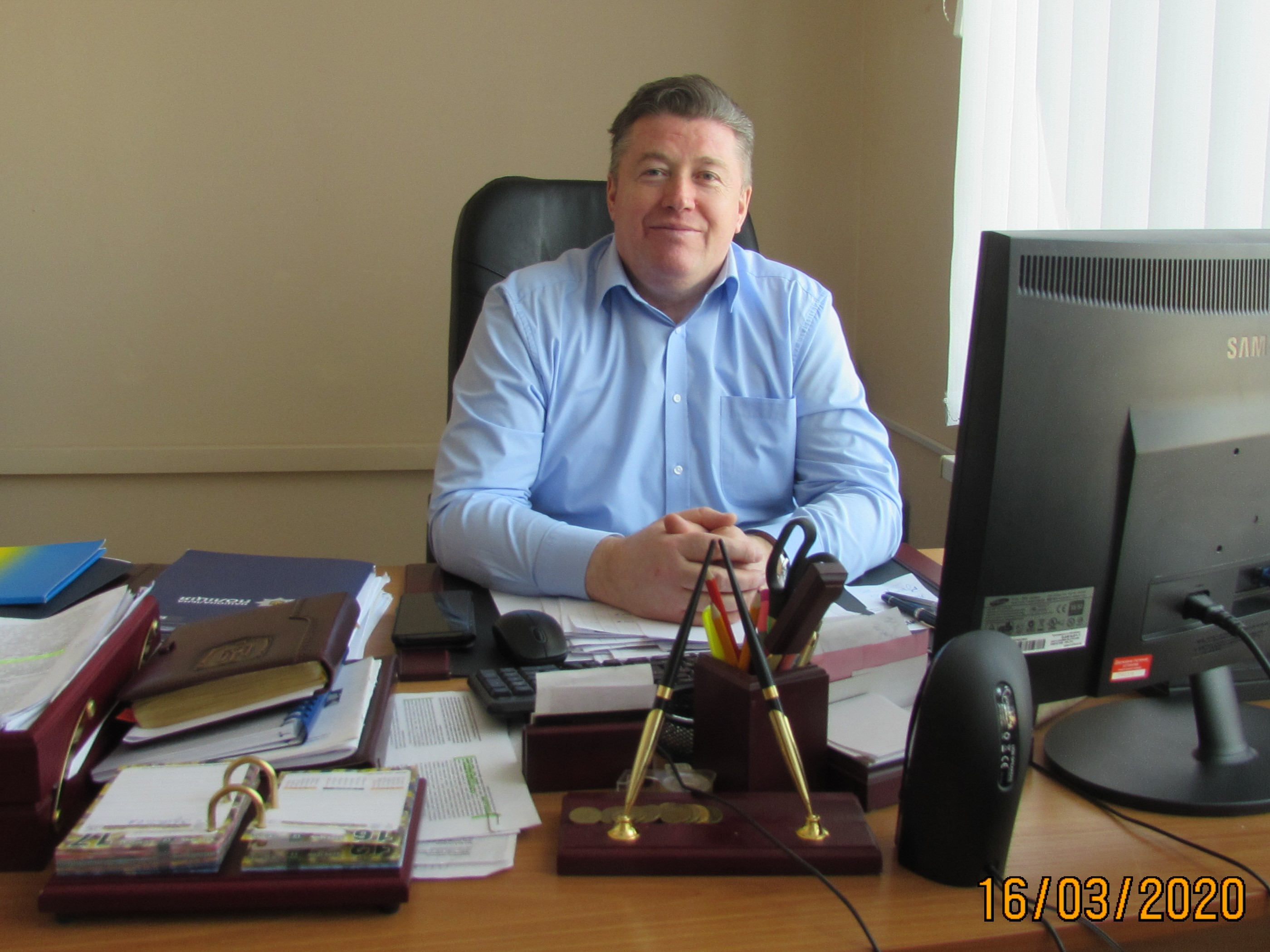 Сергій Іванович Будник, генерал-майор, учасник бойових дій, заступник Голови правління Державної іпотечної установи України